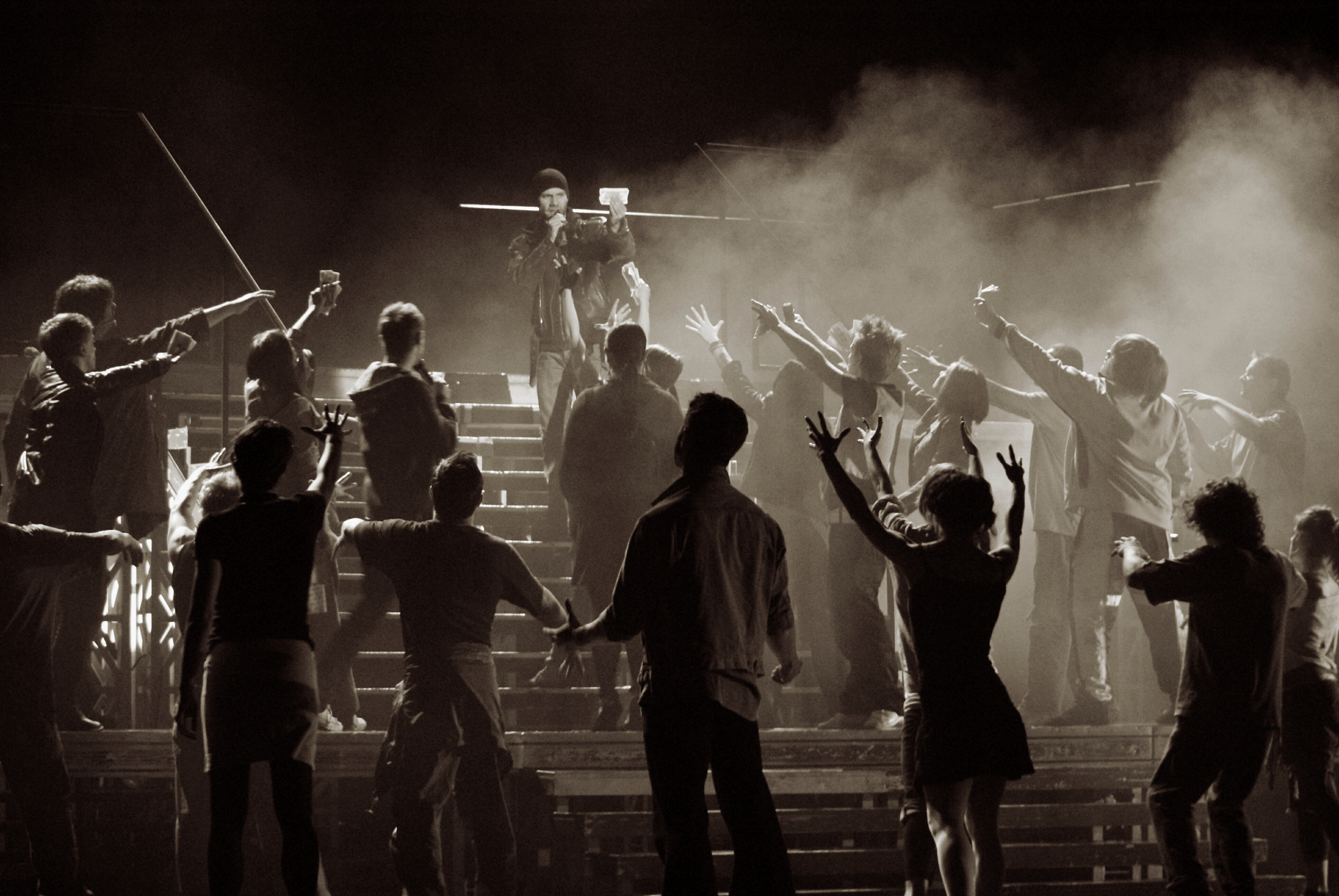 Jerzy Grzechnik & Zespół "Metra".